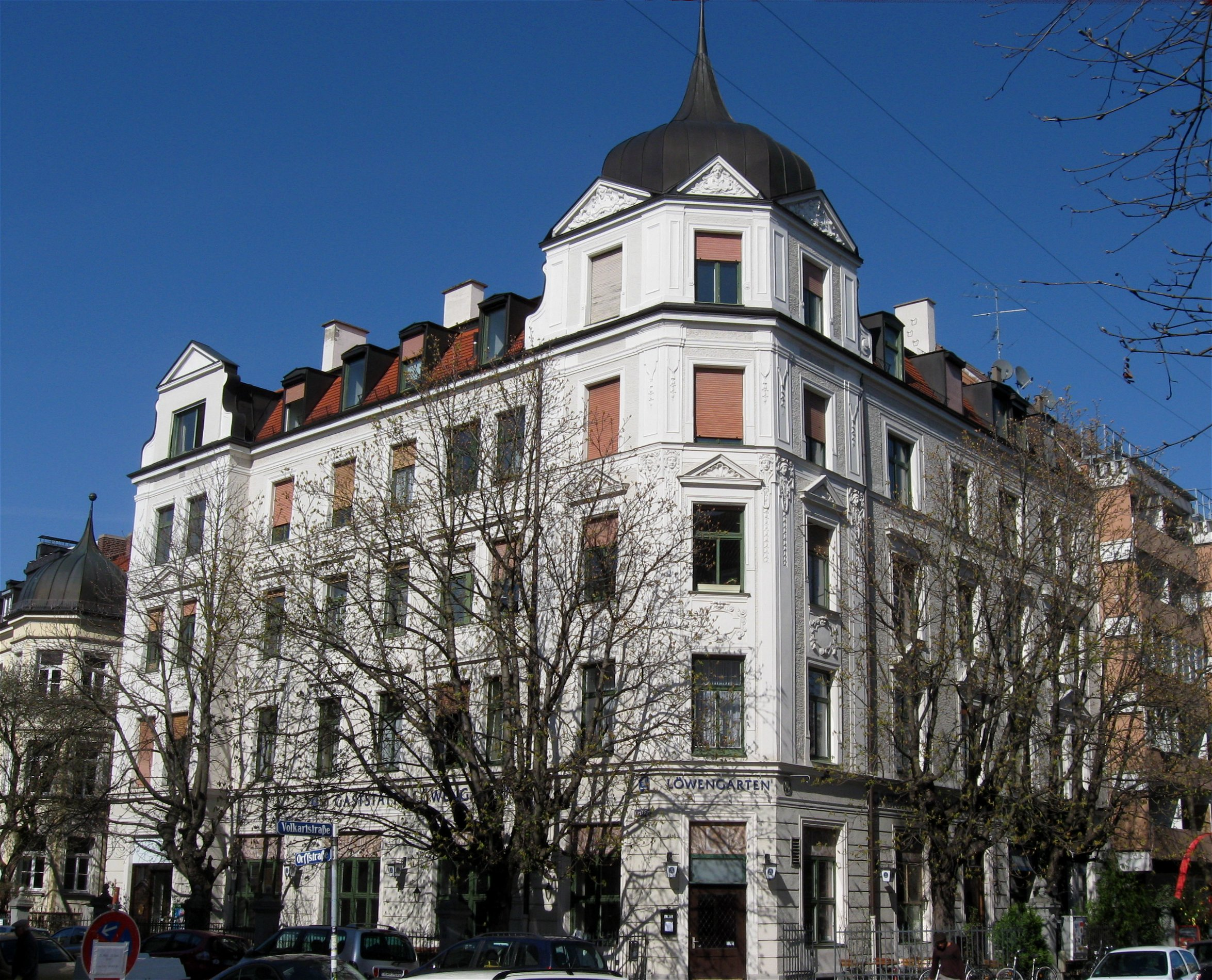 Volkartstraße 32; Mietshaus, Eckbau im Übergang Neurenaissance/Jugendstil, mit Eckkuppel und Erker, reich gegliedert und stuckiert, um 1900; samt Vorgartenzaun; vgl. auch Ensemble Orffstraße.